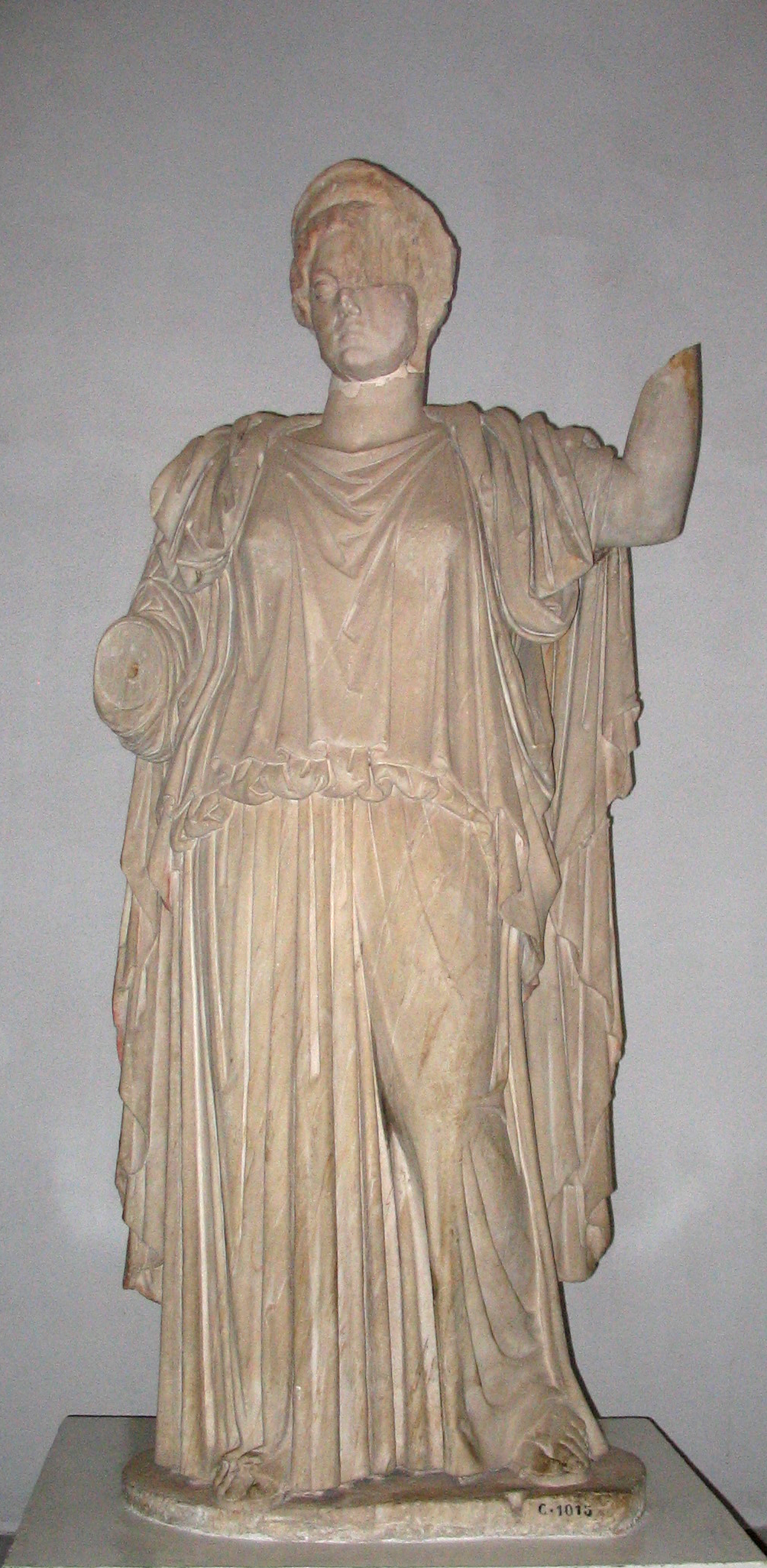 Ceres Diademea, scultura romana II sec., ex Museo nazionale del Bardo,Tunisi.